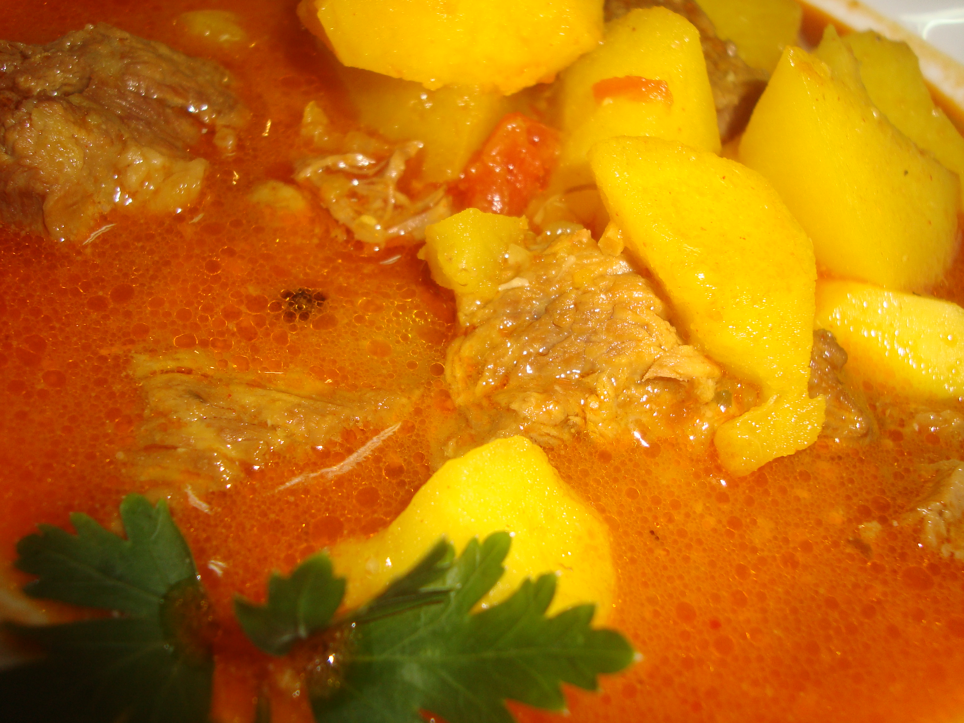 Guiso de patatas con carne.